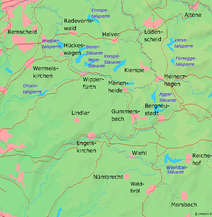 Karte des oberbergischen Landes